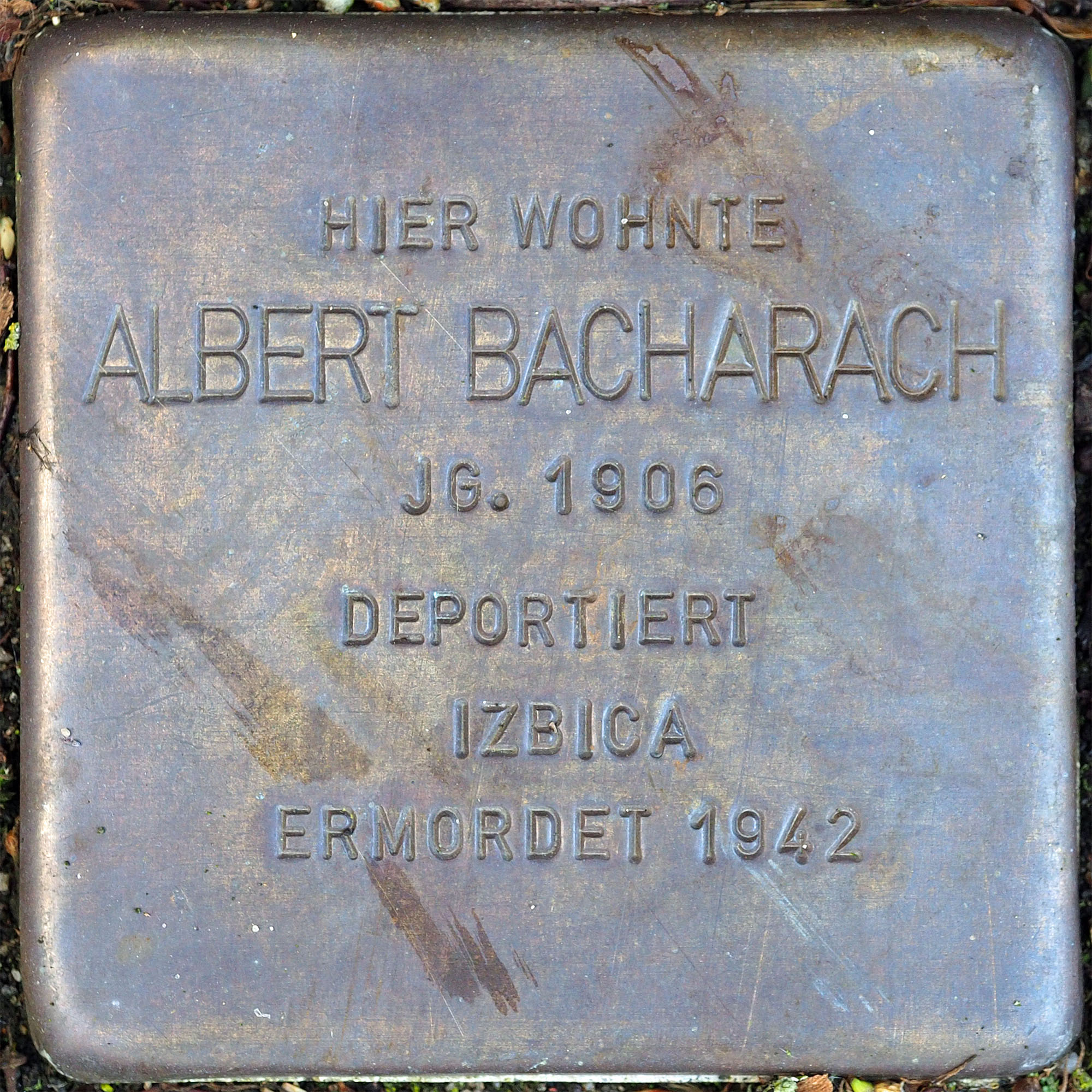 Stolpersteine MG: Bacharach, Albert